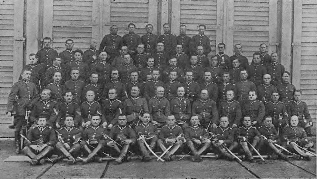 Korpus podoficerski 5 Lwowskiego Pułku Artylerii Lekkiej (1928)